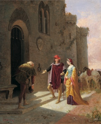 Pia dei Tolomei condotta al castello di Maremma